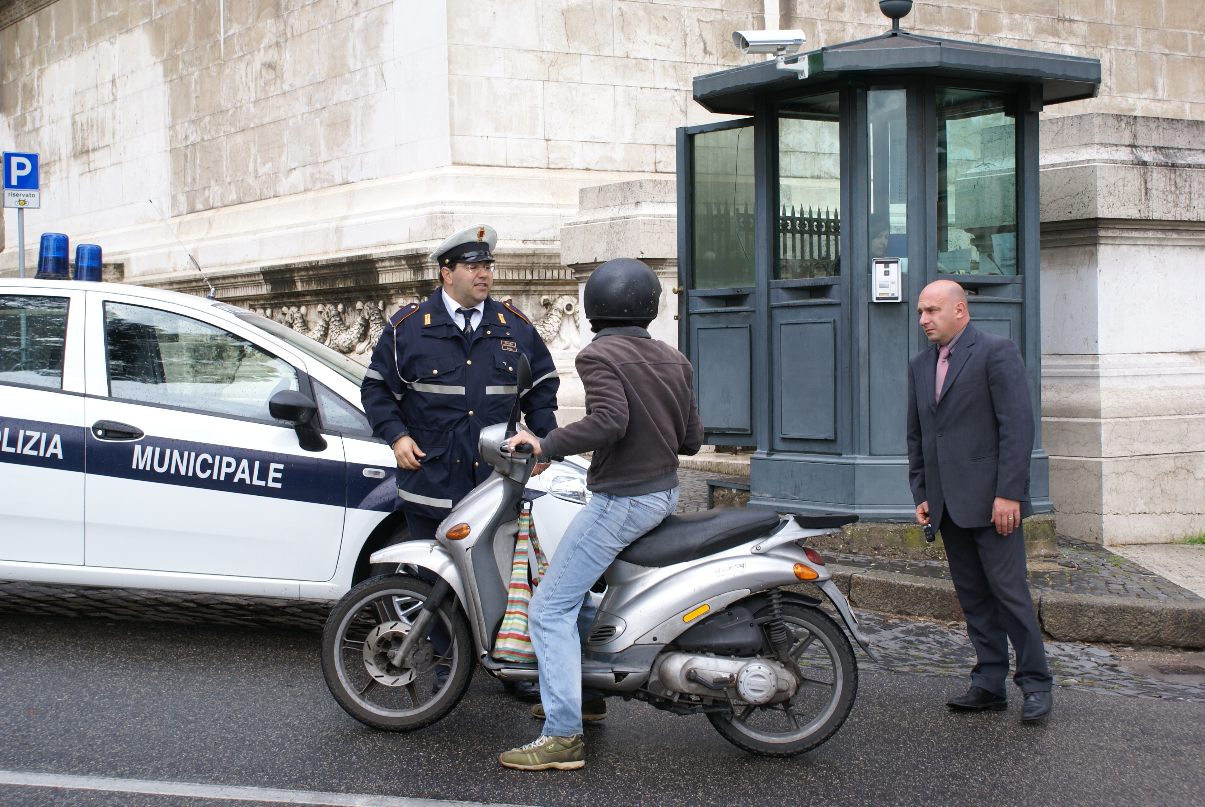 Un policier et un motocycliste à Rome en Italie